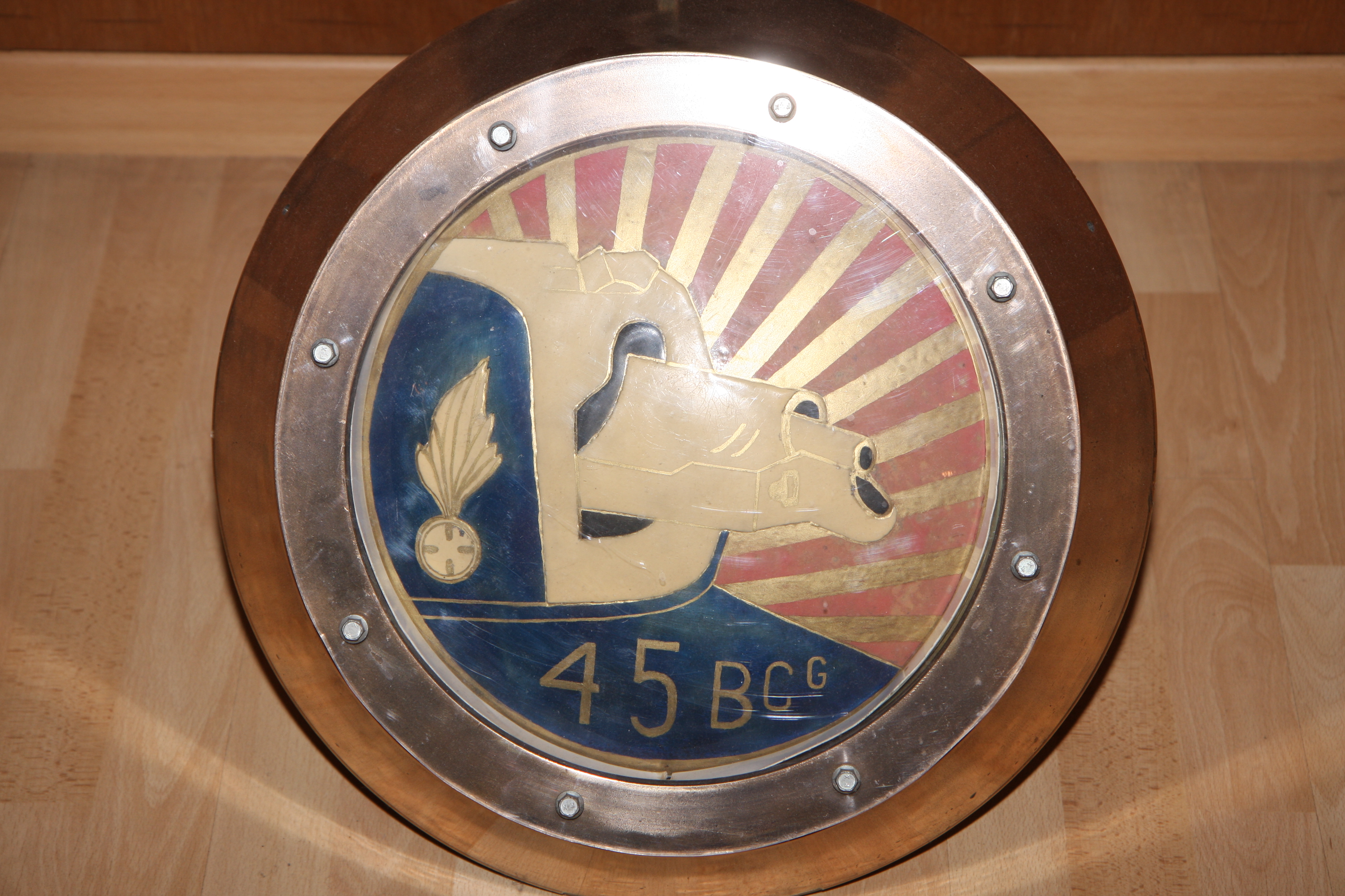 Emblème du 45e BCC - Salle de traditions du GBGM - Satory (78)